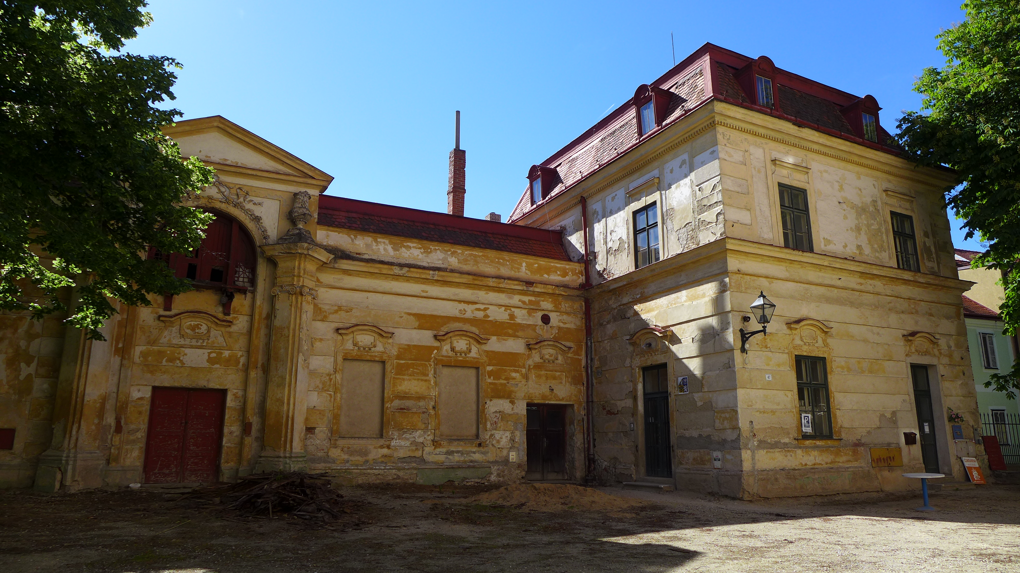 Zámek Jemnice s parky, Husova 1, 2, 3, Havlíčkovo náměstí 8, 47, Obůrka 174, Tyršova 622, 872